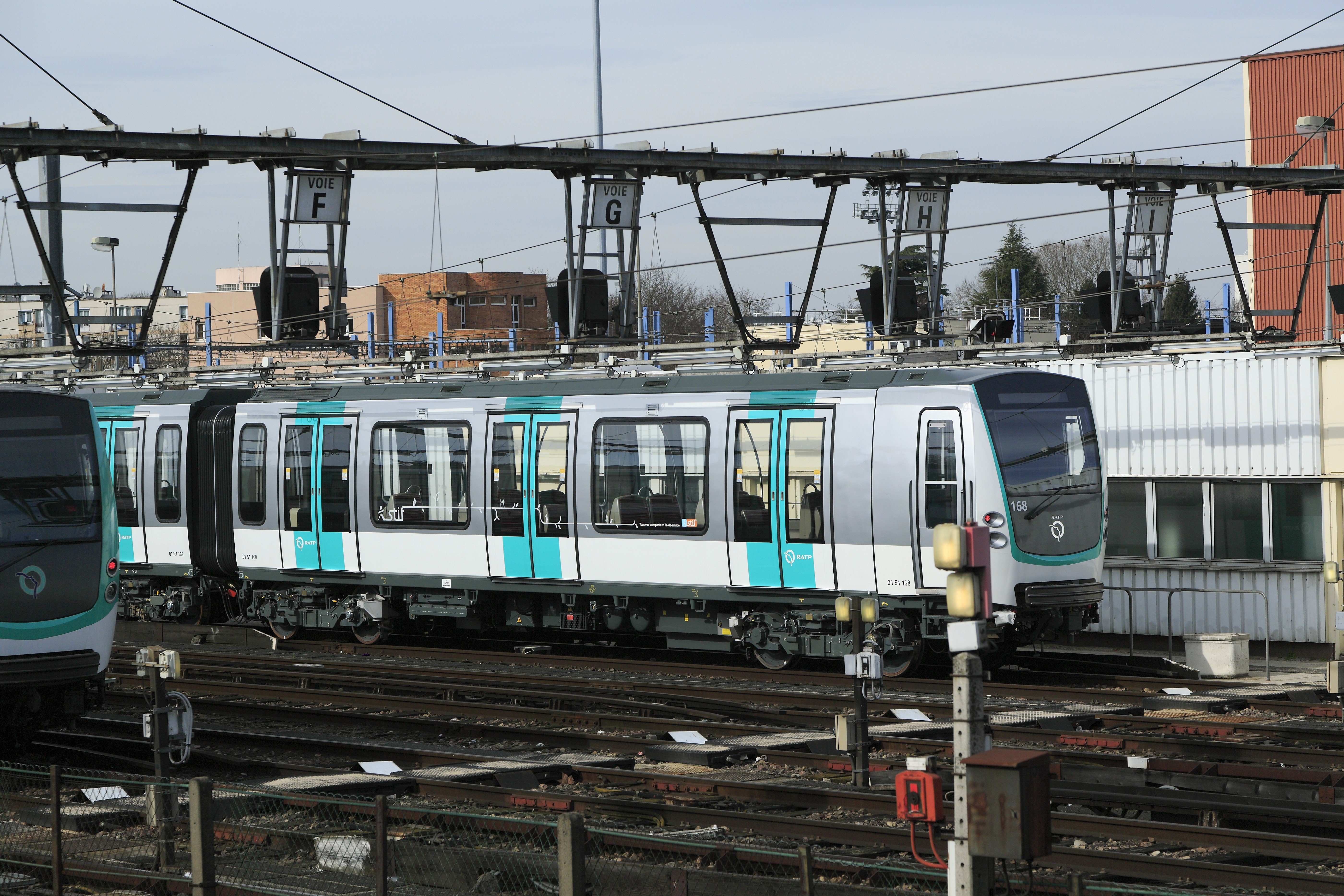 Zug der Reihe MF 01 in der Freiabstellgruppe des Bw mit dem neuen Anstrich des STIF. Die Einheit wurde neu angeliefert und bisher kaum, möglicherweise noch gar nicht eingesetzt. Auch die Drehgestelle weisen keine Verschmutzungsspuren auf.